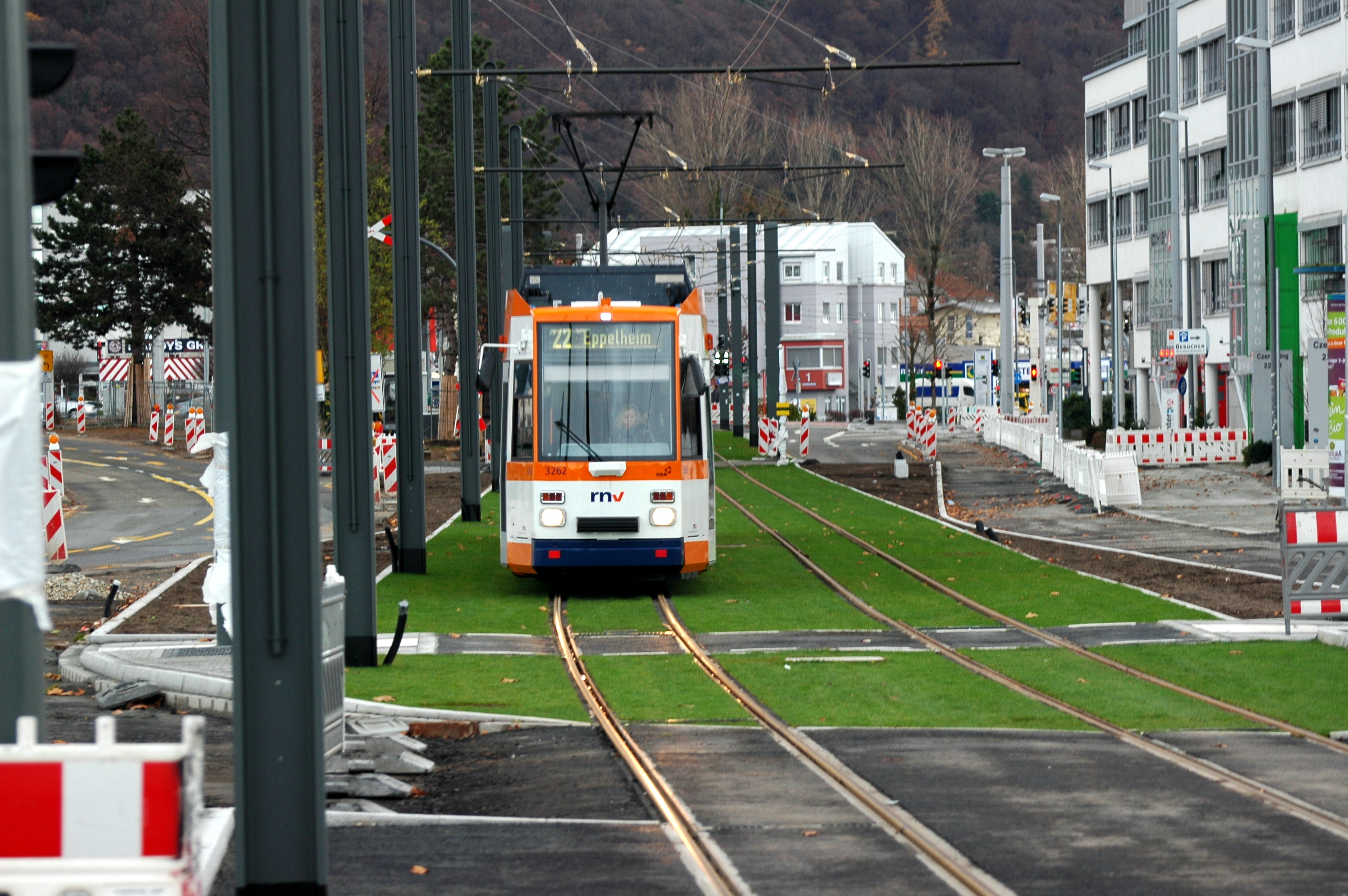 Tram transport in Heidelberg in 2018